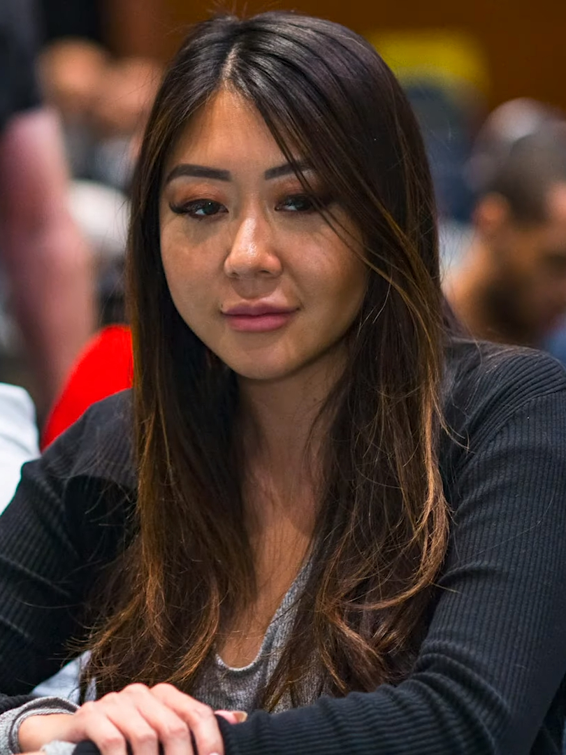 Maria Ho beim WPT bestbet Bounty Scramble